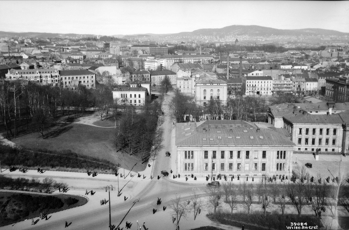 Frederiks gate sett fra Stortingsgaten 28, 1933